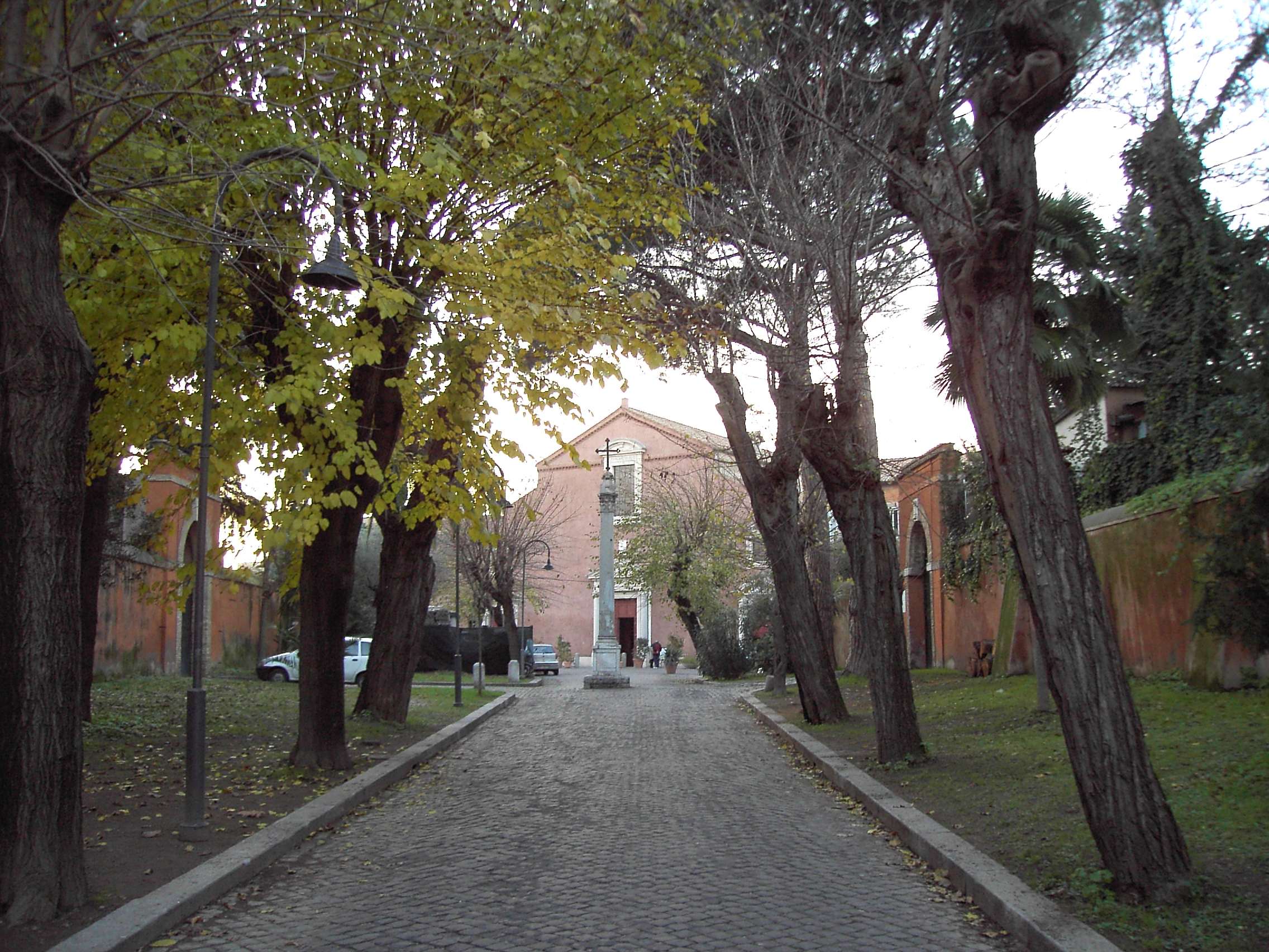 Roma, chiesa di san Pancrazio - il viale d'ingresso.